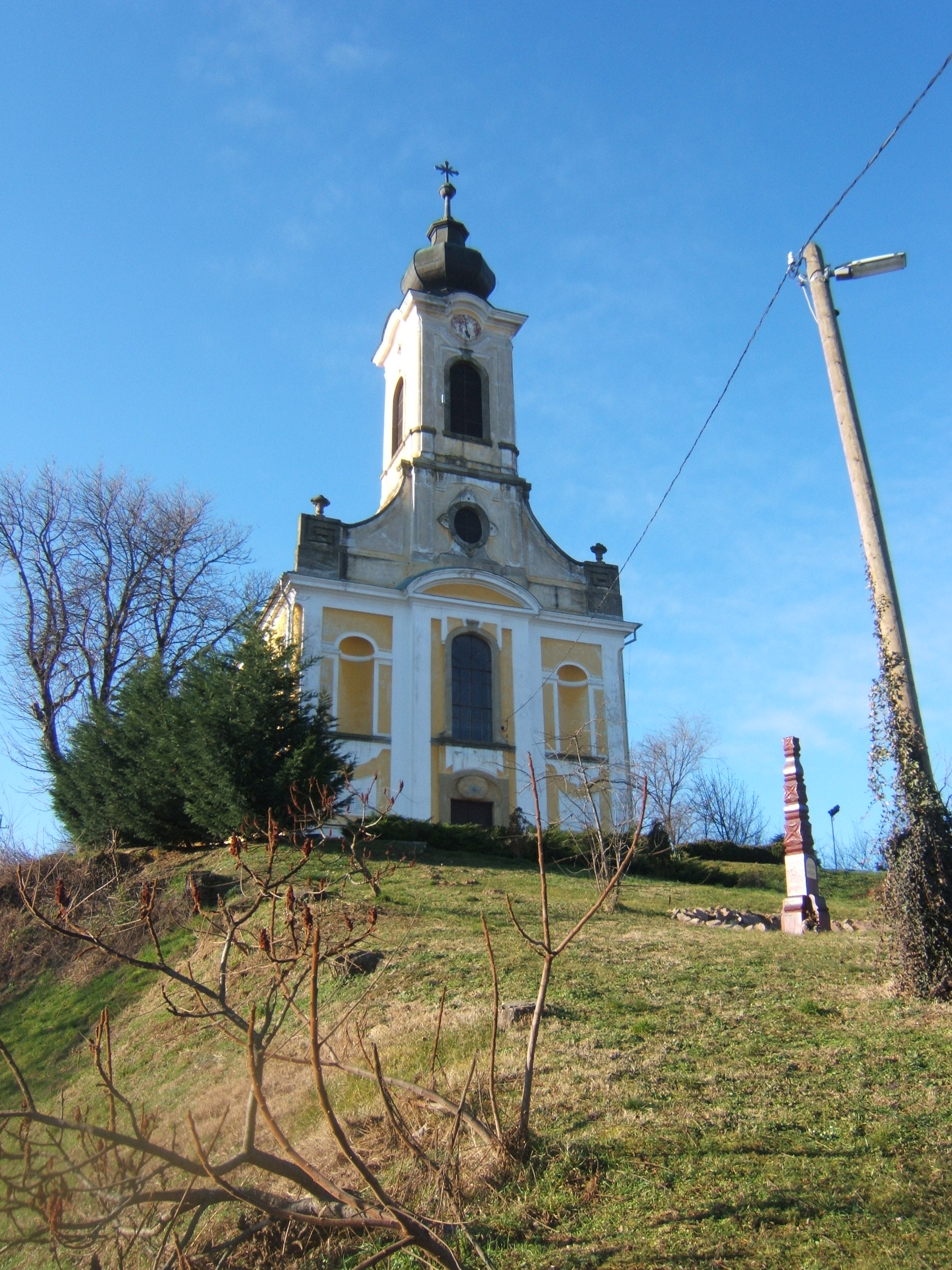 Keszü, templom